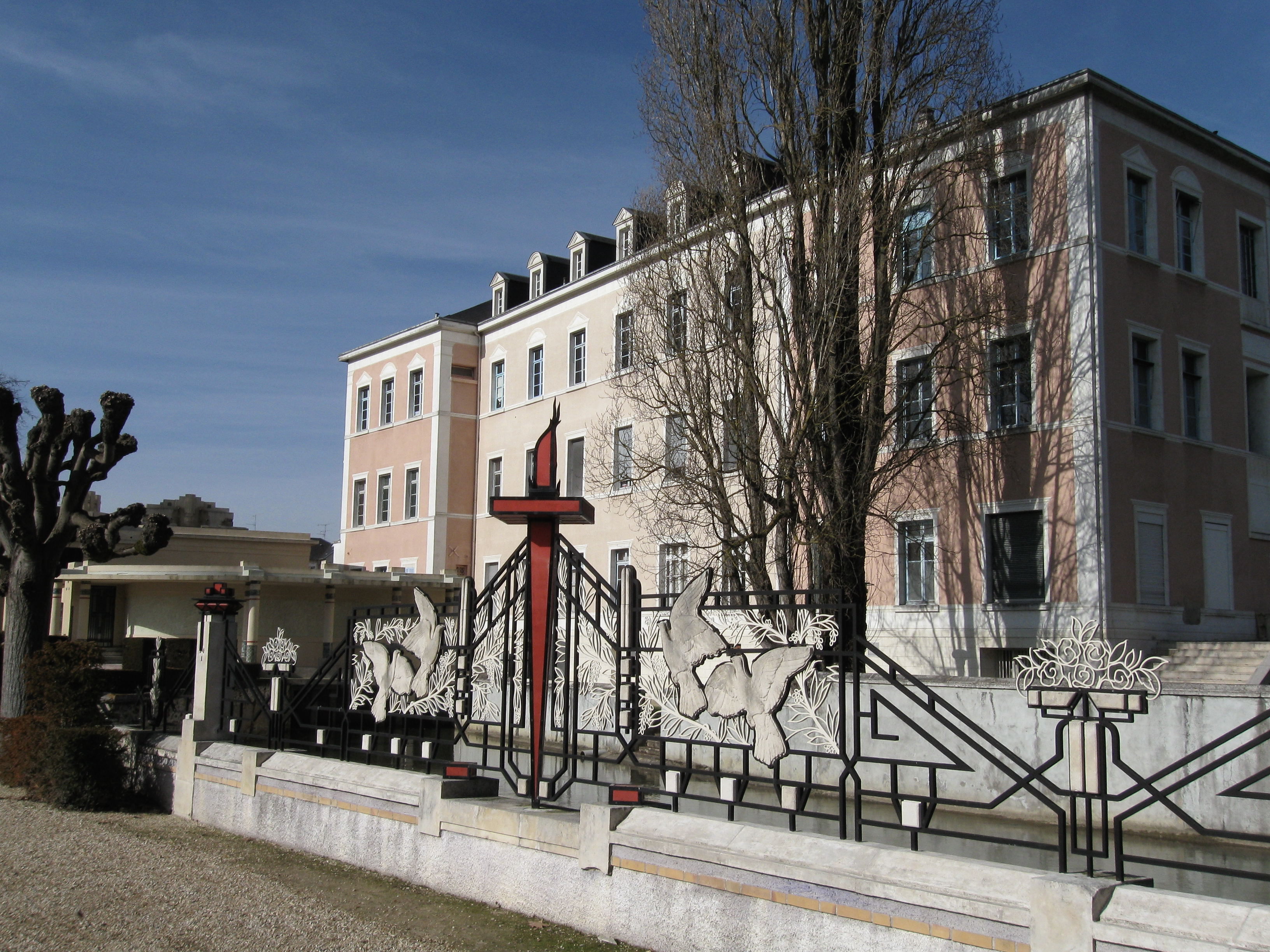 Hôtel de Ville, façade arrière le long de l'Yèvre, Vierzon, Cher, France